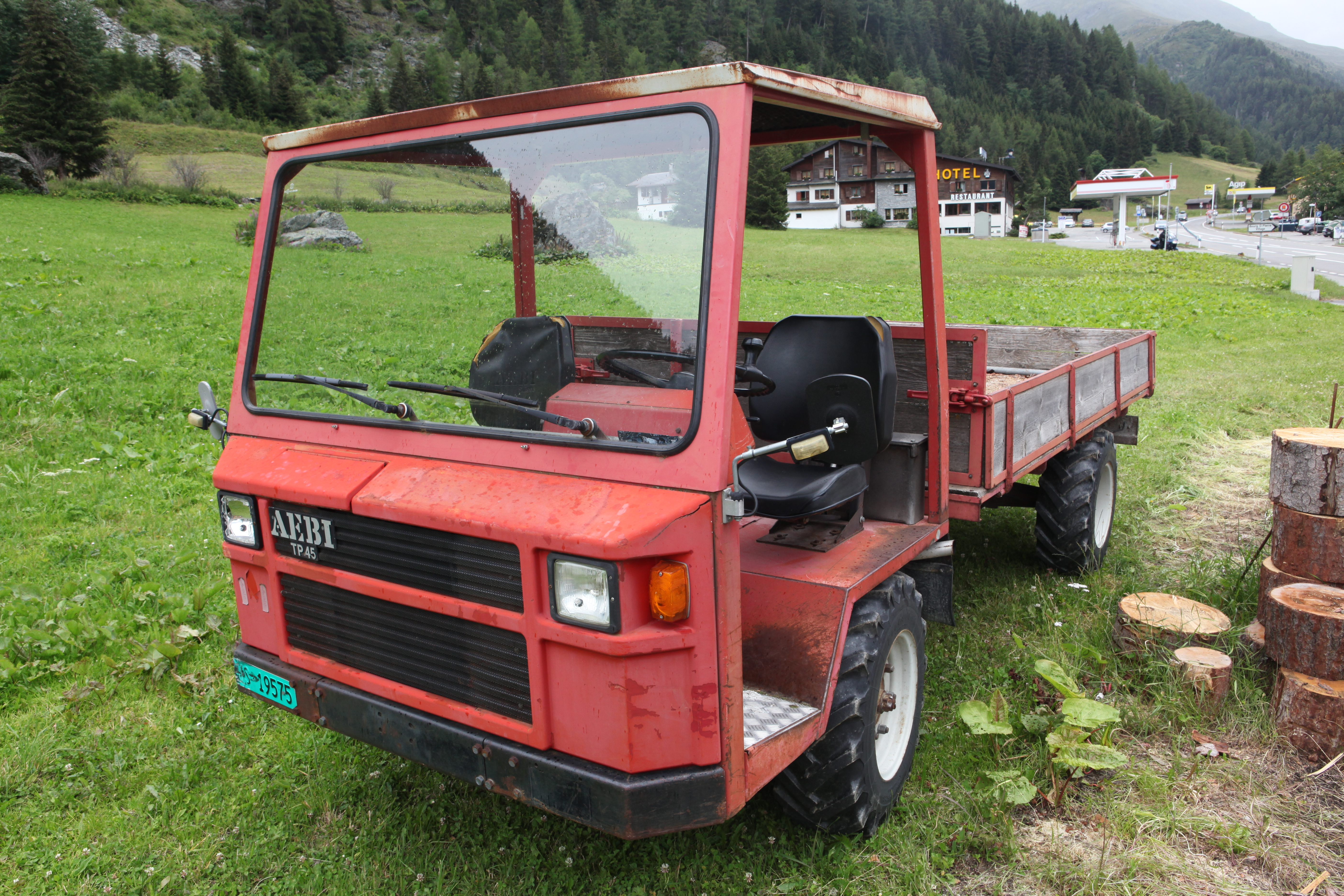 Aebi-Transporter TP 45